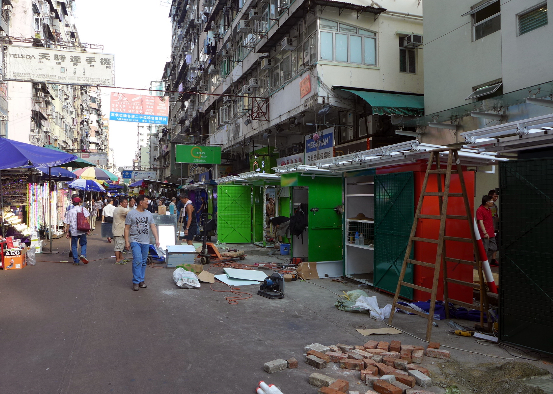 Apliu Street